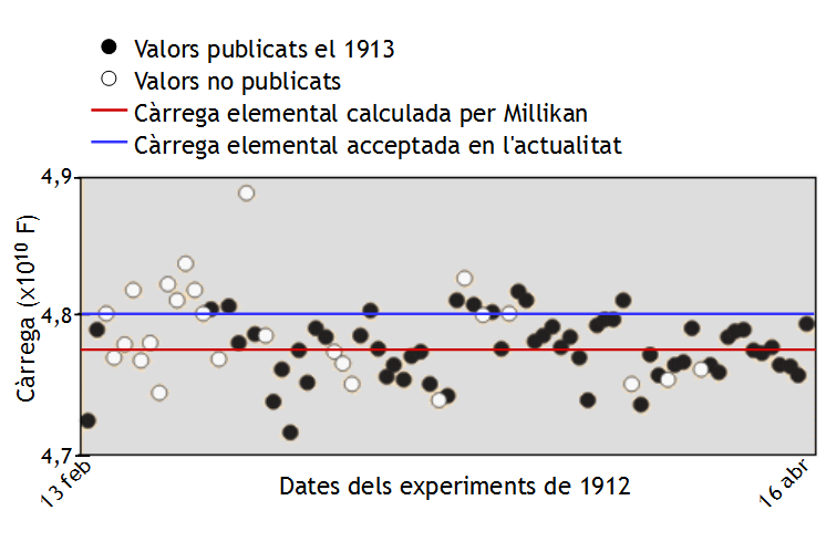 Dades experimentals obtingudes per Robert A. Millikan el 1912 i les publicades el 1913, corresponets a l'experiment que permeté determinar la càrrega elemental.